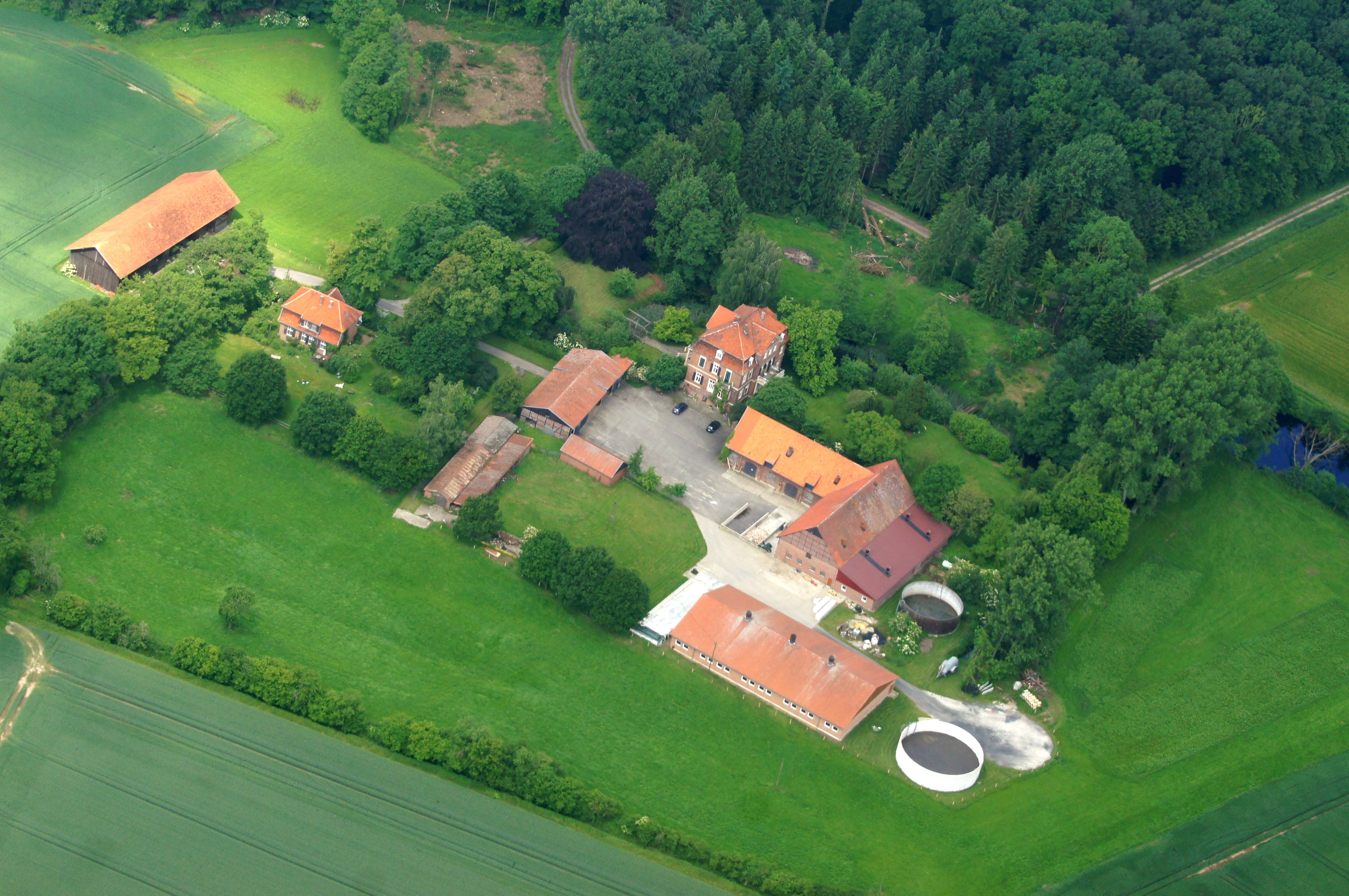 Haus Loevelingloh bei Münster, Nordrhein-Westfalen, Deutschland. Das Foto entstand während des Münsterland-Fotoflugs am 1. Juni 2014. Hinweis: Die Aufnahme wurde aus dem Flugzeug durch eine Glasscheibe hindurch fotografiert.